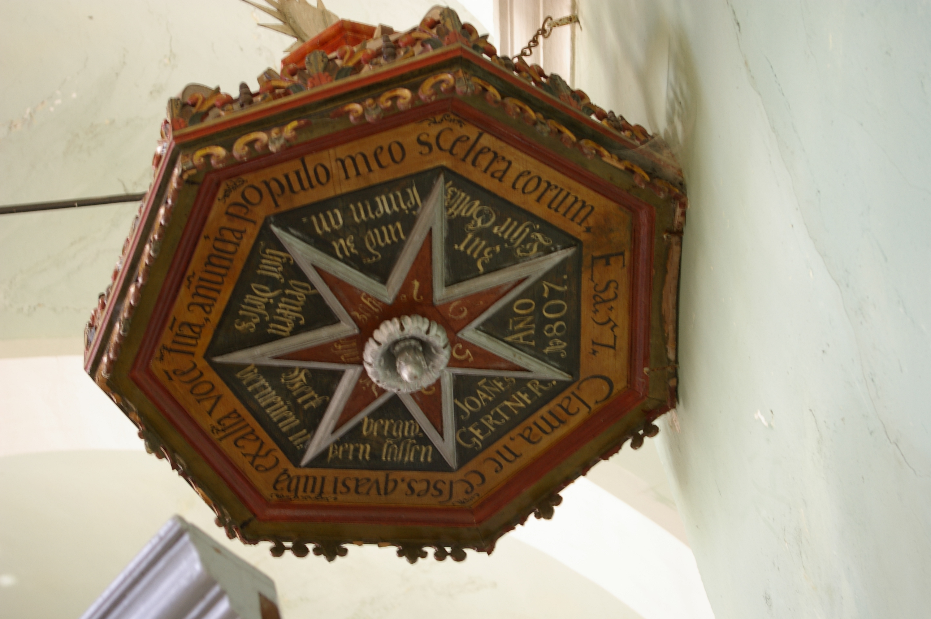 Kanzeldeckel von 1652 in Seligstadt